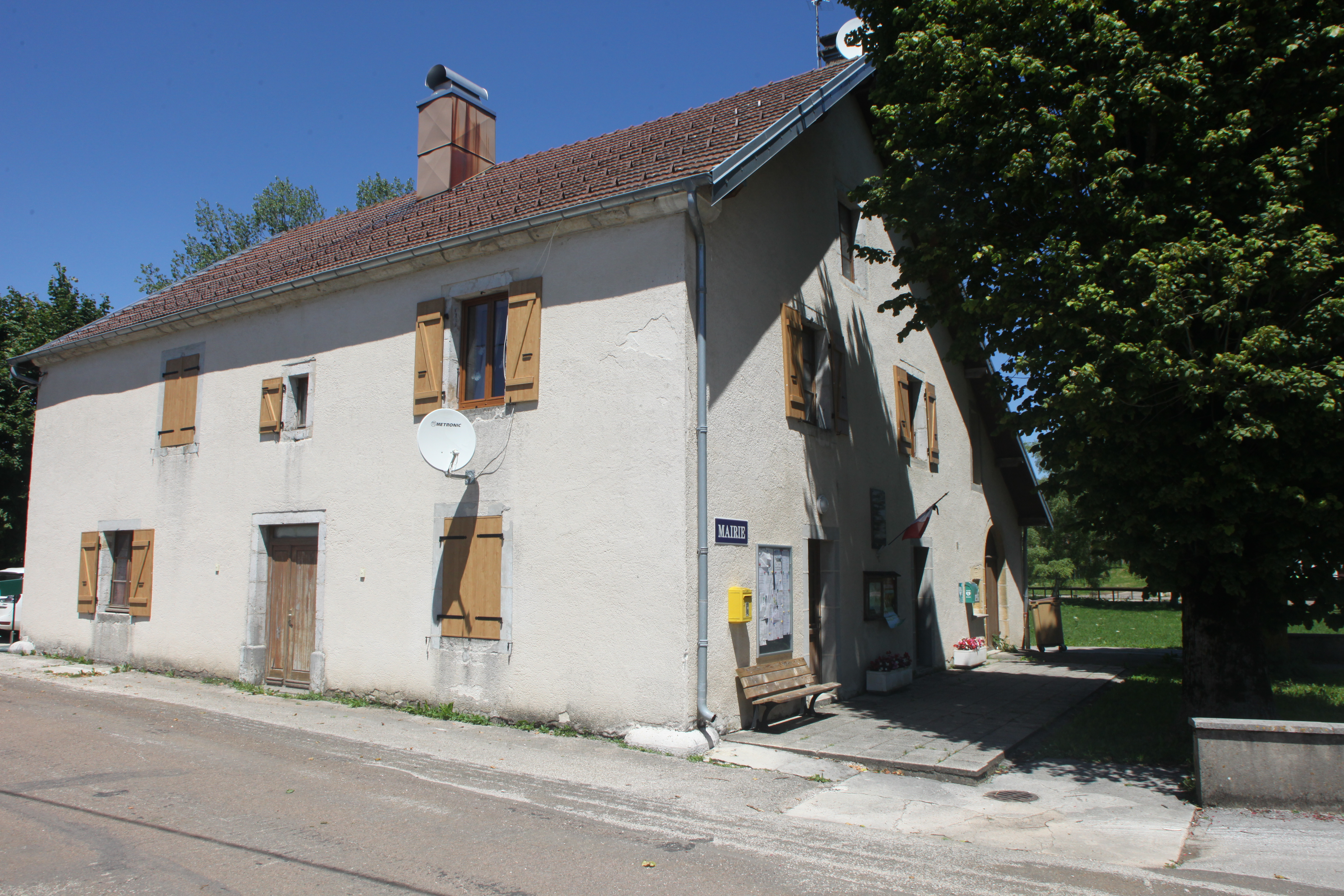 Mairie de Billecul (Jura).